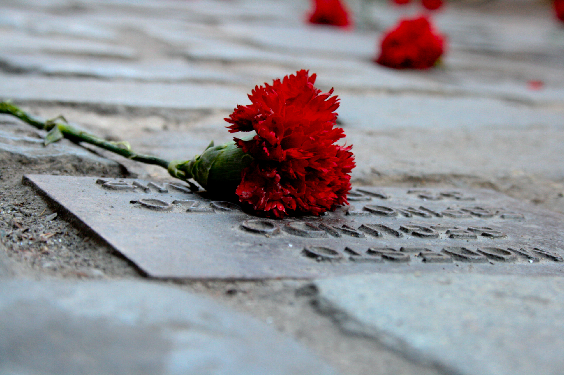 Ex centro de detención en la dictadura del General Pinochet. Placa en honor a Modesto Segundo Espinoza Pozo. This is a photo of a national monument in Chile: 935